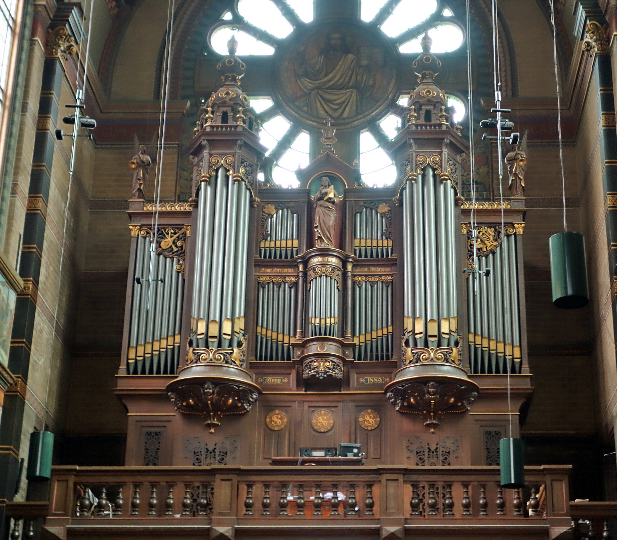 Orgel in Amsterdam, St. Nicolaas